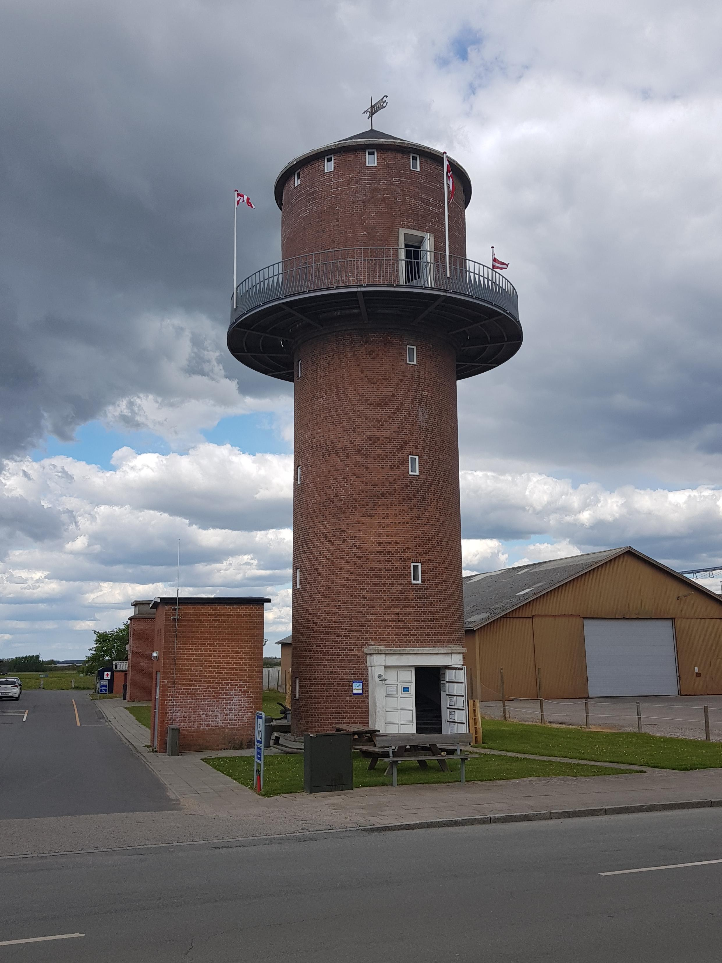 Højer Vandtårn set fra syd, i åbningstiden